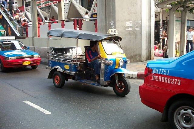 タクシーの中を走るトゥクトゥク. バンコクのトゥクトゥク.